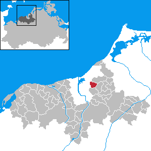 Mönchhagen in Mecklenburg-Western Pomerania - District Bad Doberan